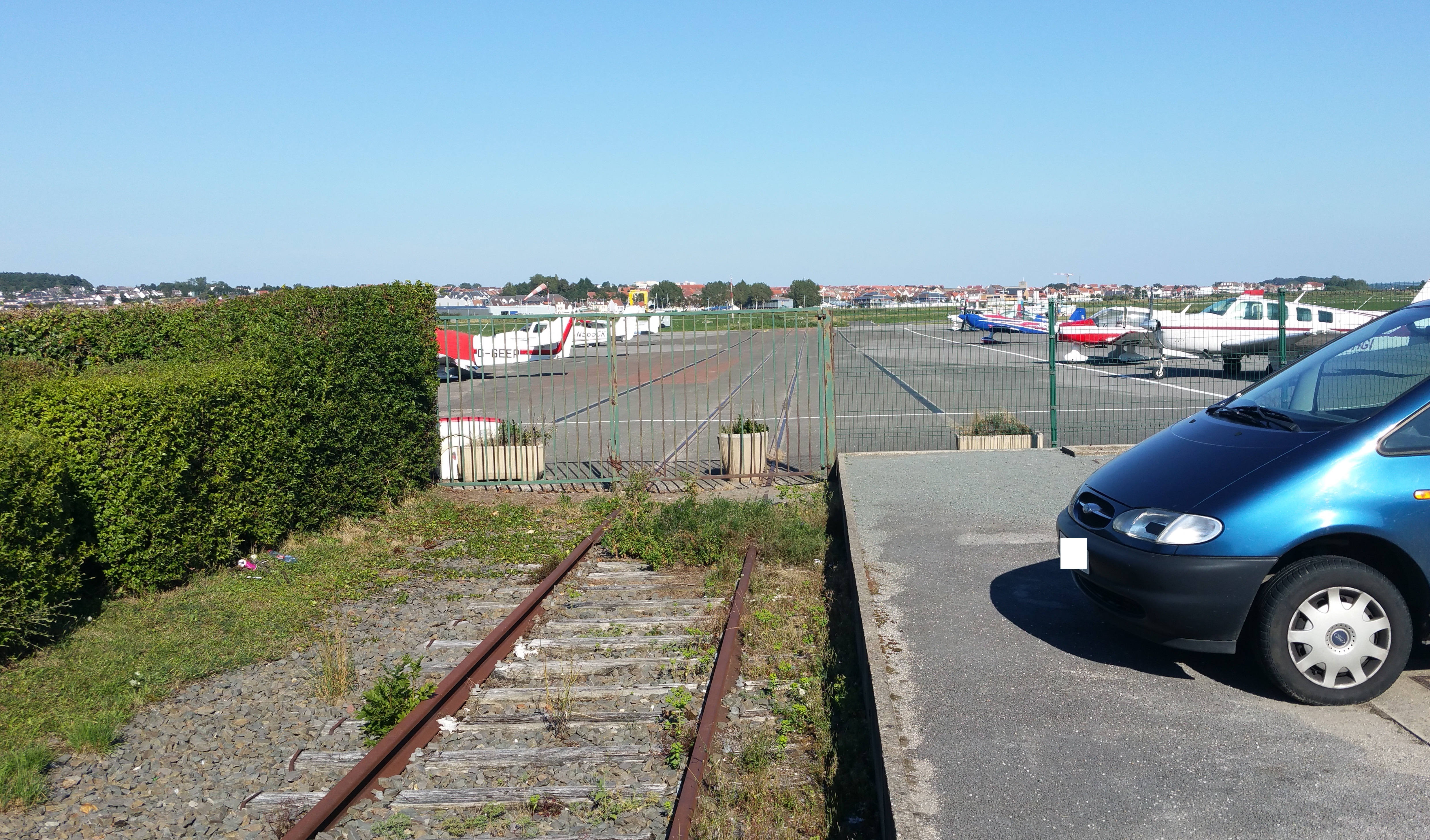 Vue d'une voie ferroviaire passant par le tarmac de l'aéroport du Touquet-Paris-Plage.